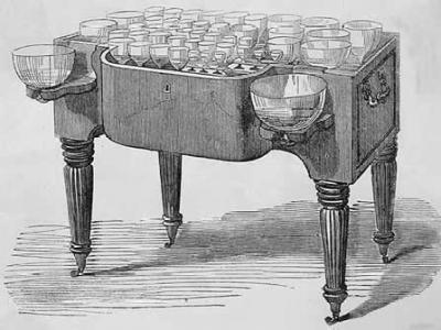 Gravure extraite de L'Illustration (1860)